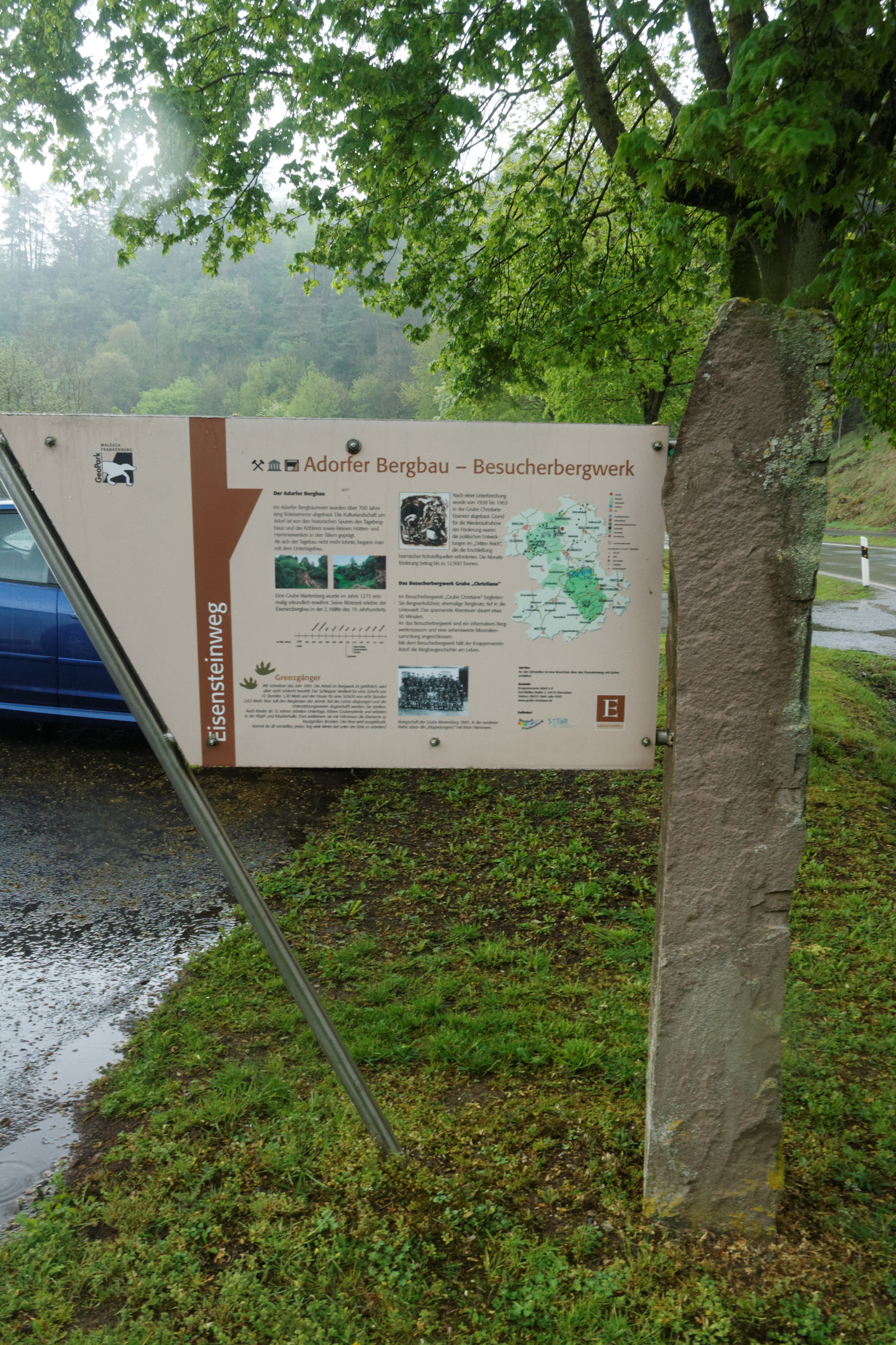 Infotafel auf dem Parkplatz der Grube Christiane